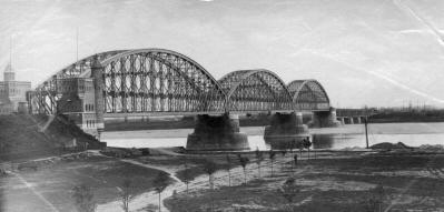 Railway bridge across the river Waal in Nijmegen; Catalogusnr. 156891 Datering 01/01/1878 - 31/12/1879 Beschrijving Gezicht op de spoorbrug over de Waal te Nijmegen. Soort beeldmateriaal Fotografische documenten Categorie Topografie